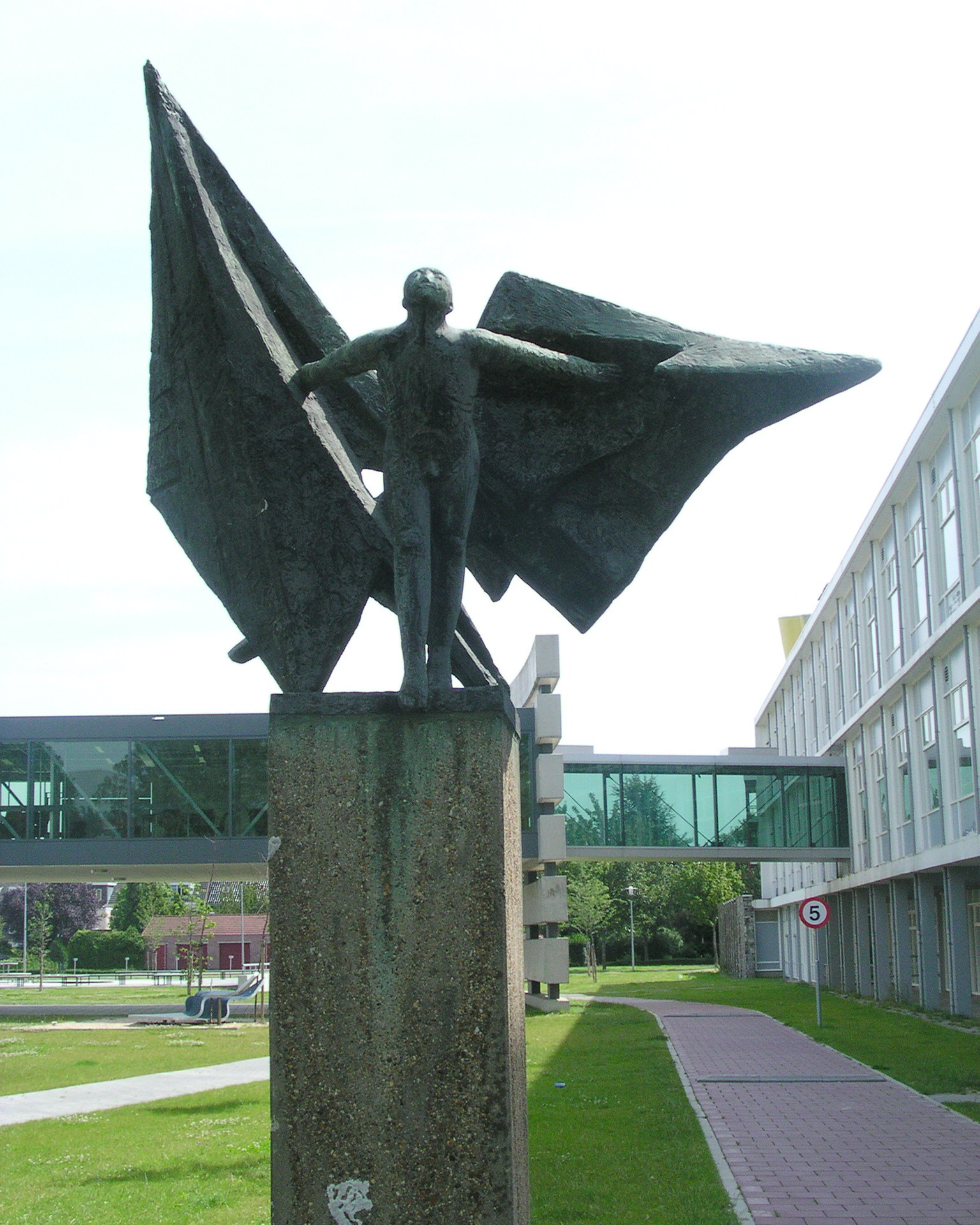 Maastricht „Technisch College Maasland“ - "Ikaros" by Frans Gast, 1963